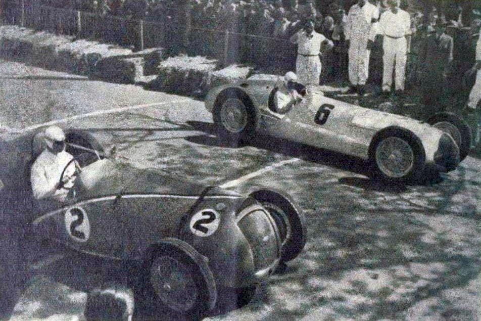 Départ du Grand Prix de Pau 1938, devant le vainqueur René Dreyfus sur Delahaye, derrière Caracciola sur Mercedes.